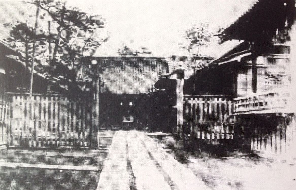 昭和16年、東京分詞境内。